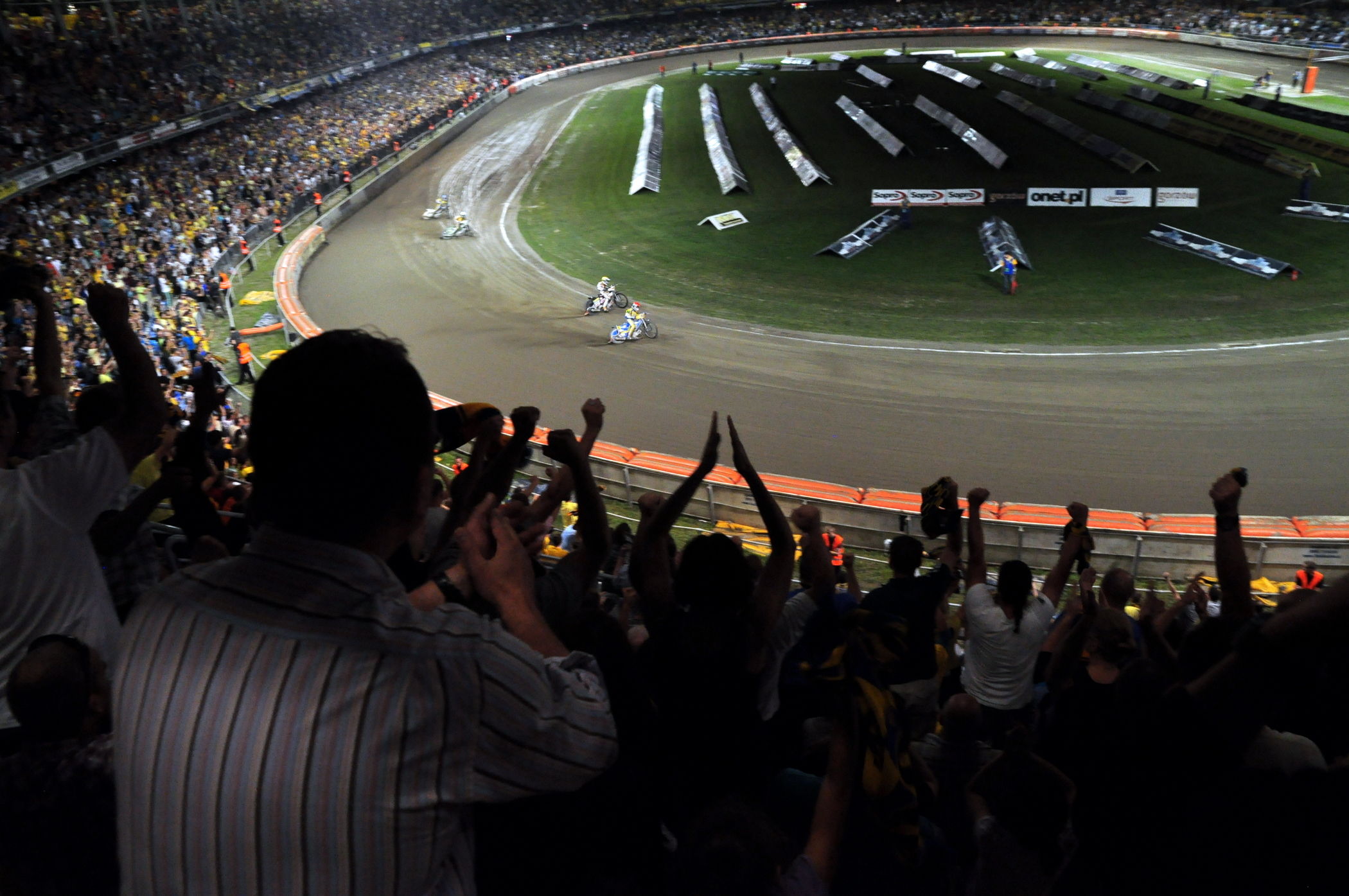 Gorzów Wlkp. - 11. 09. 2011 r.. Derby nr 75 przerwie gwałtowna burza.